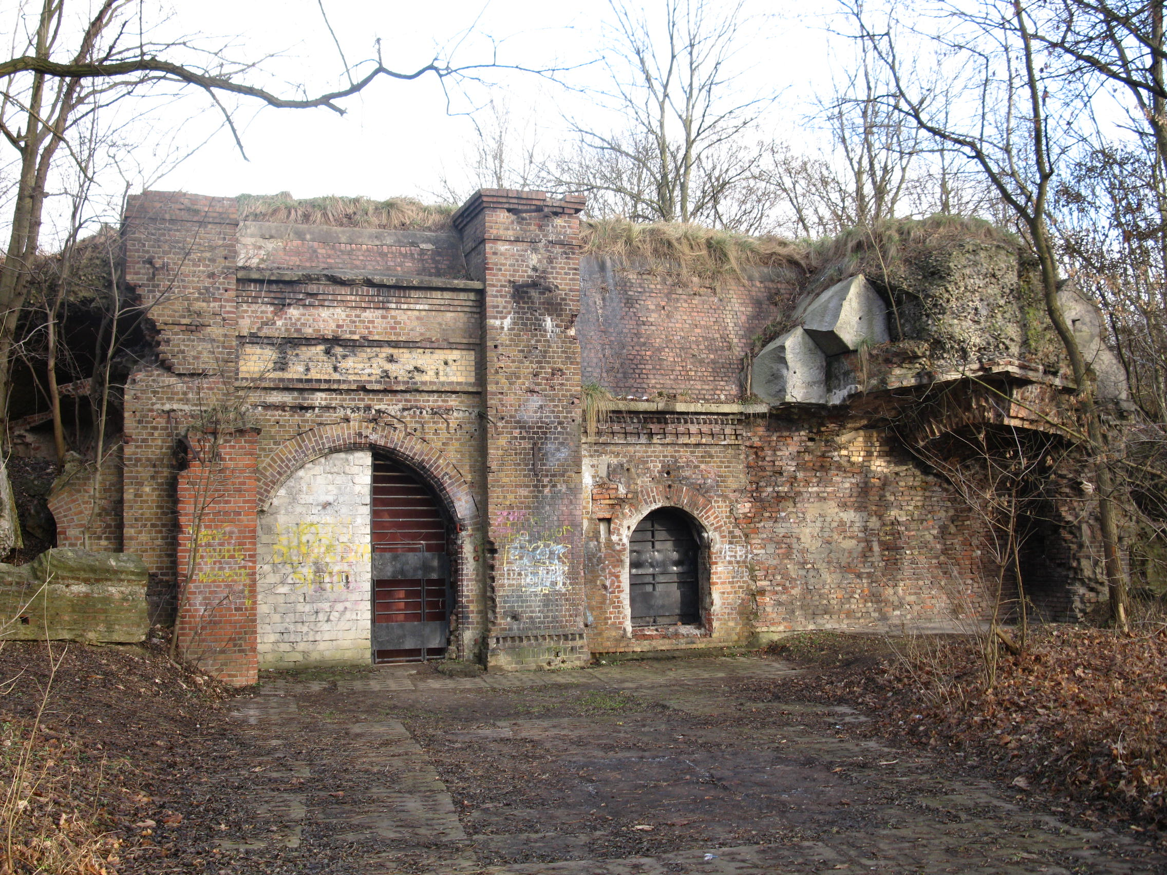 Brama główna fortu, po prawej stronie rozebrana kaponiera szyjowa